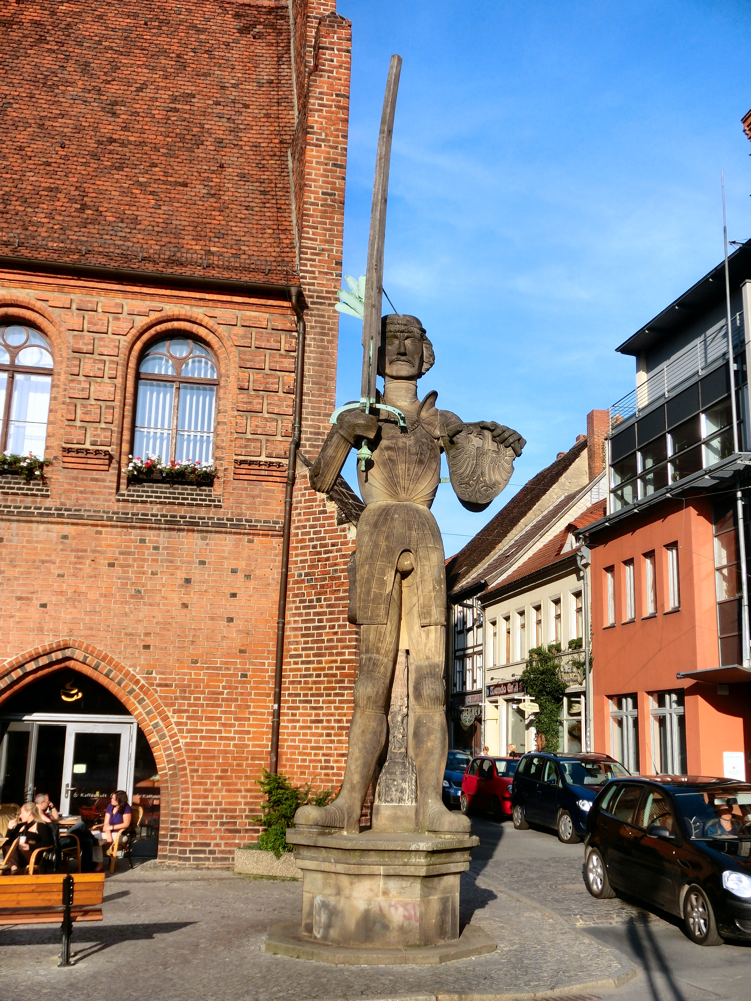 Stendal Markt Roland